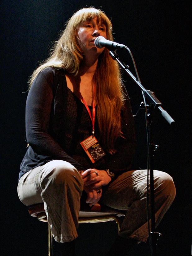 Sidsel Endresen at Moers Festival 2007